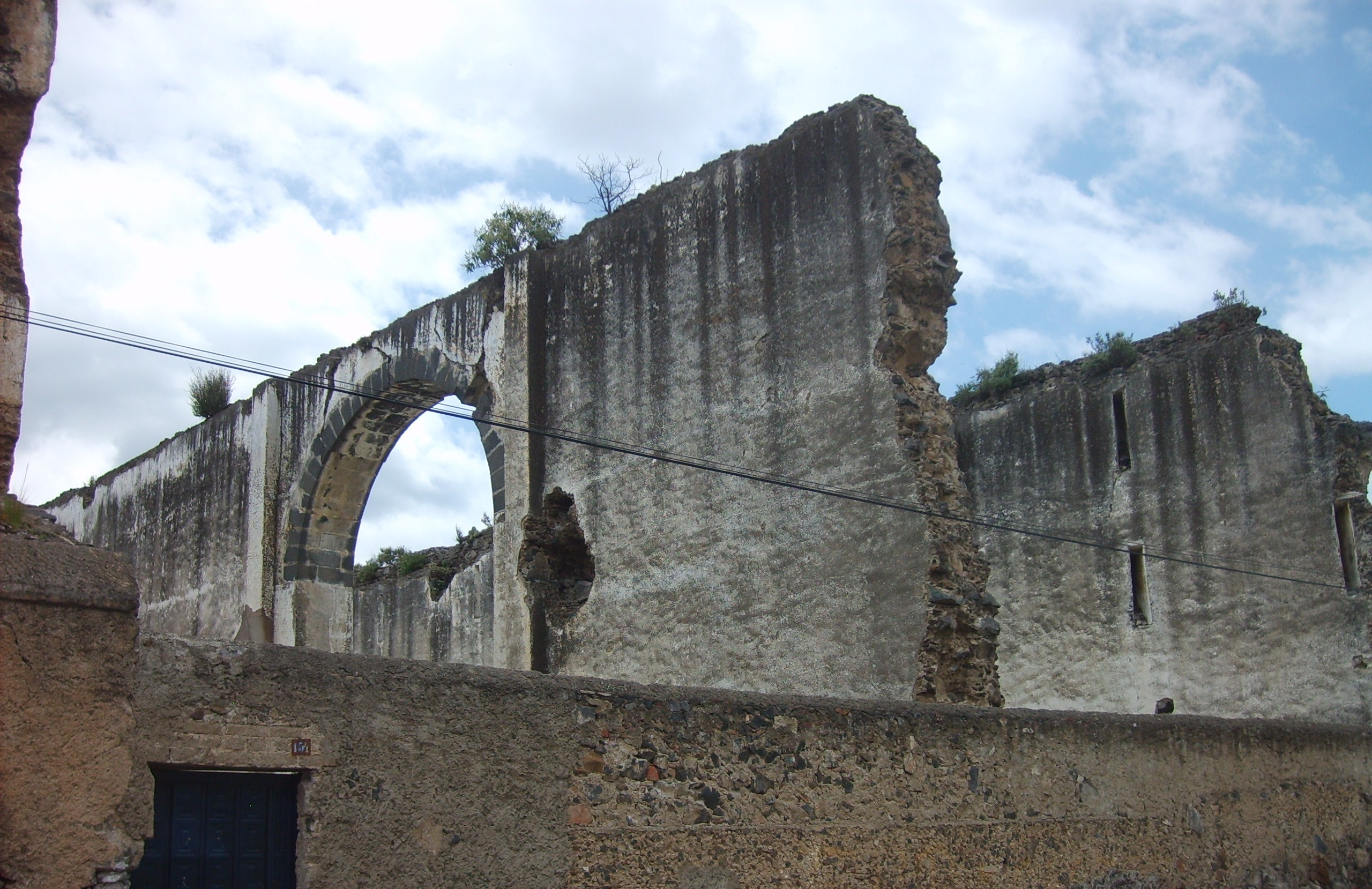 Sobre la calle llamada de la explosión se aprecian los daños causados a los muros de la colecturía de los diezmos de San Andrés, Chalchicomula, Puebla, México.